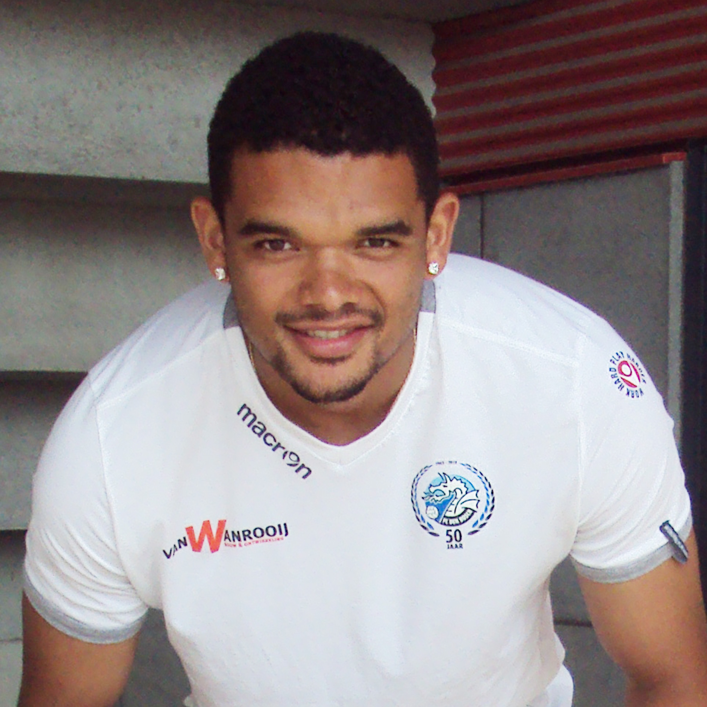 Kadeem Pantophlet tijdens de Open Dag, genaamd De Aftrap, van FC Den Bosch op 18 juli 2015.